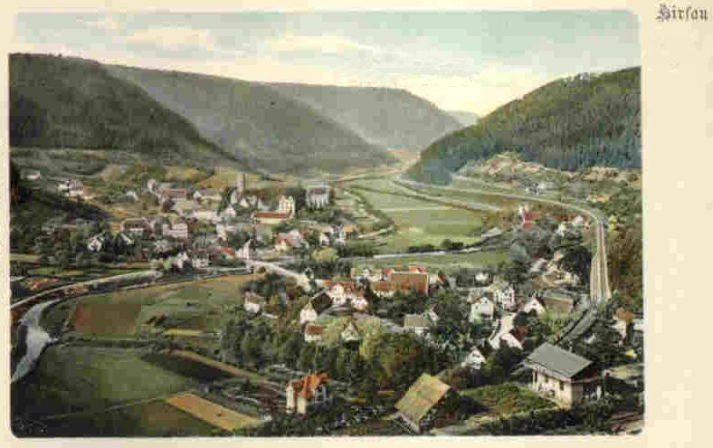 Ansichtskarte aus Hirsau